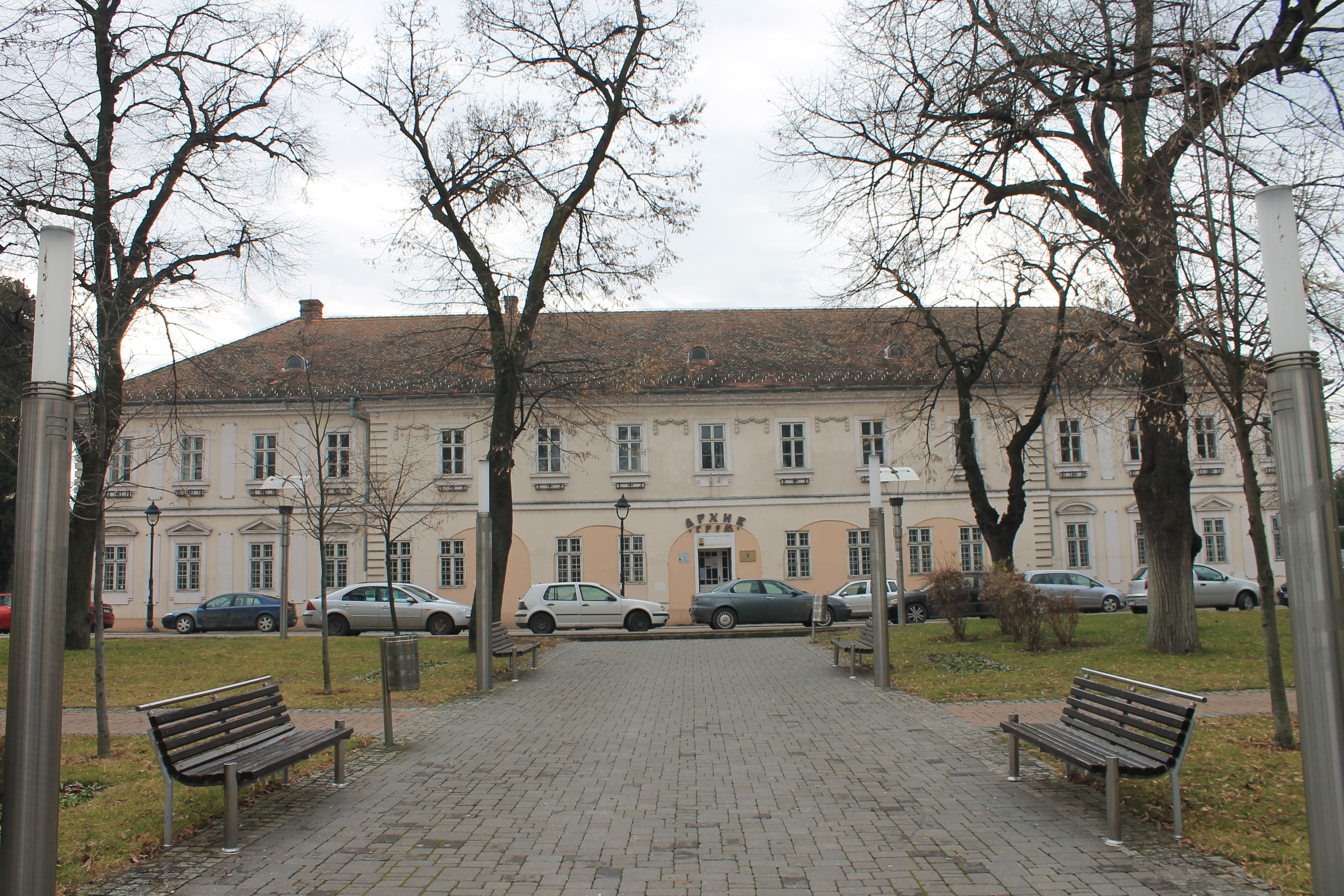 Zgrada Glavne straže, Sremska Mitrovica